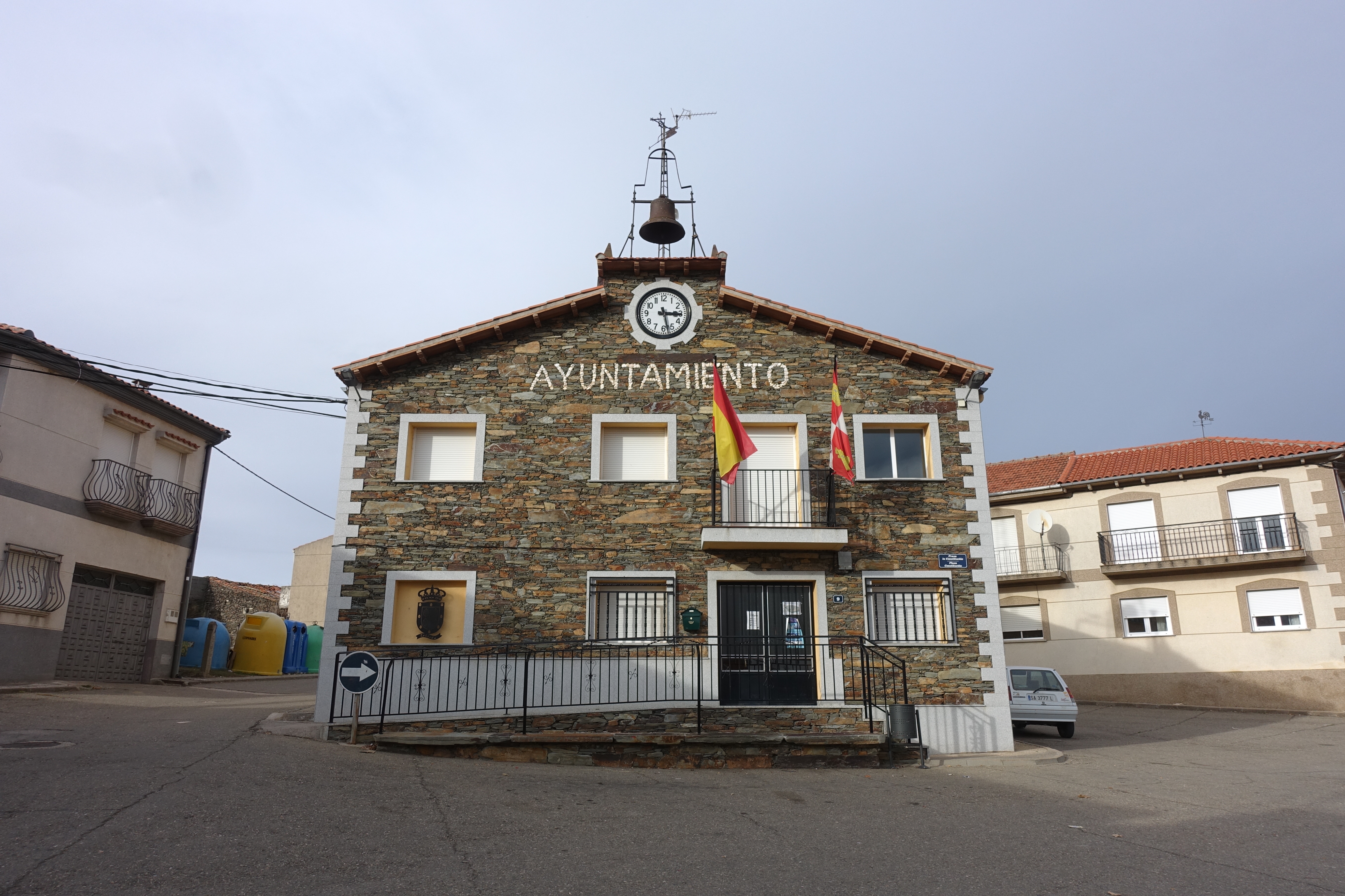 Casa consistorial de Robleda (Salamanca, España).